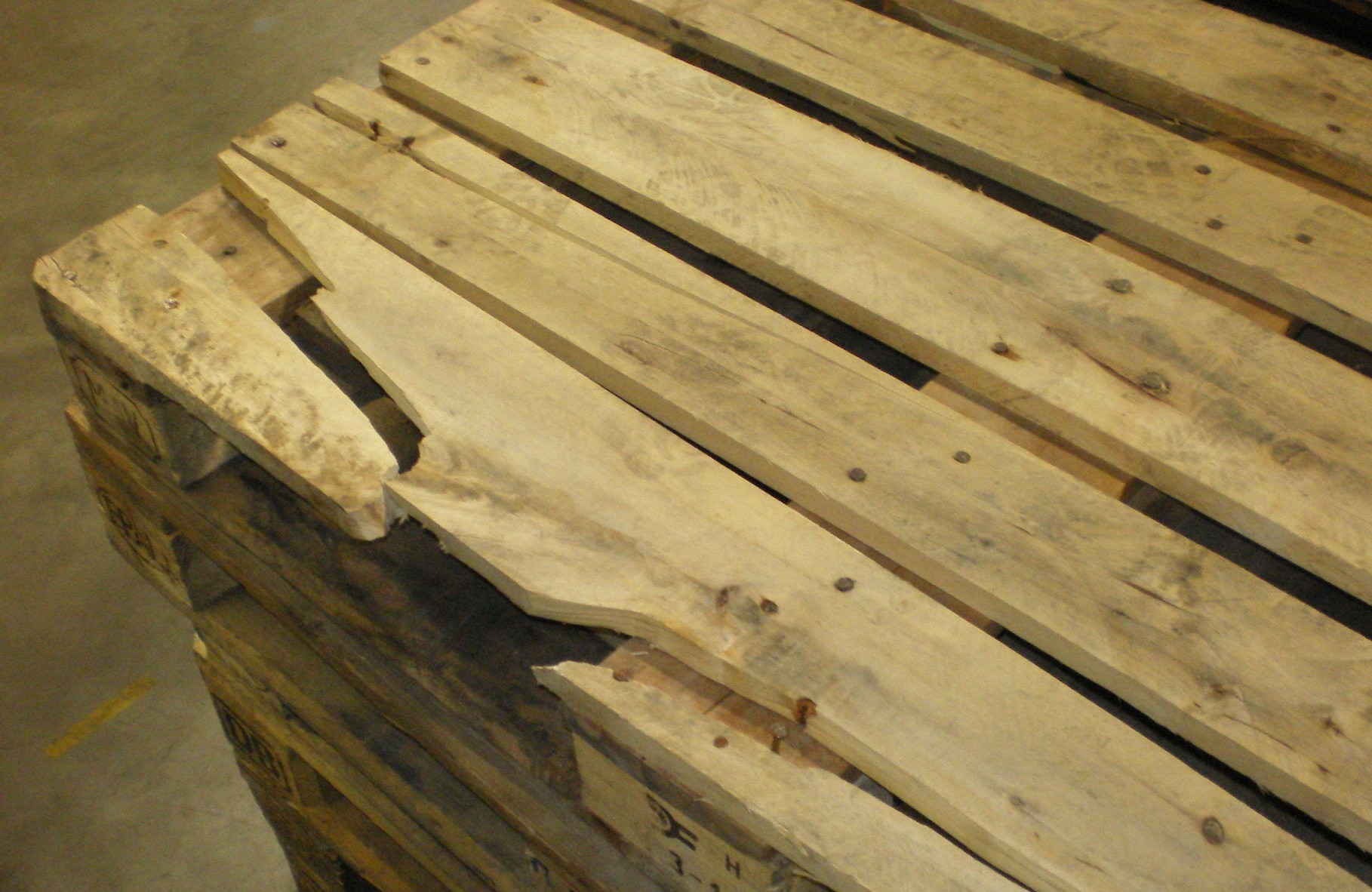 Beschädigte Europalette – 2 Deckbretter gebrochen bzw. gesprungen